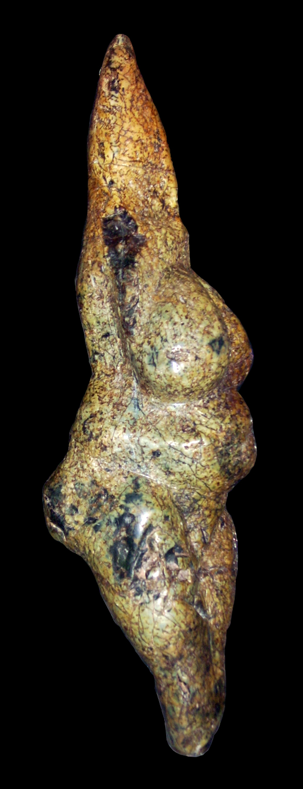 Vénus gravettienne de Savignano (Italie) - photographie personnelle au Musée Pigorini de Rome - Vincent Mourre